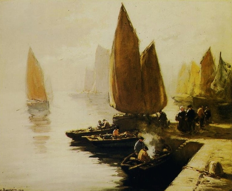 Bateaux de pêche à Concarneau